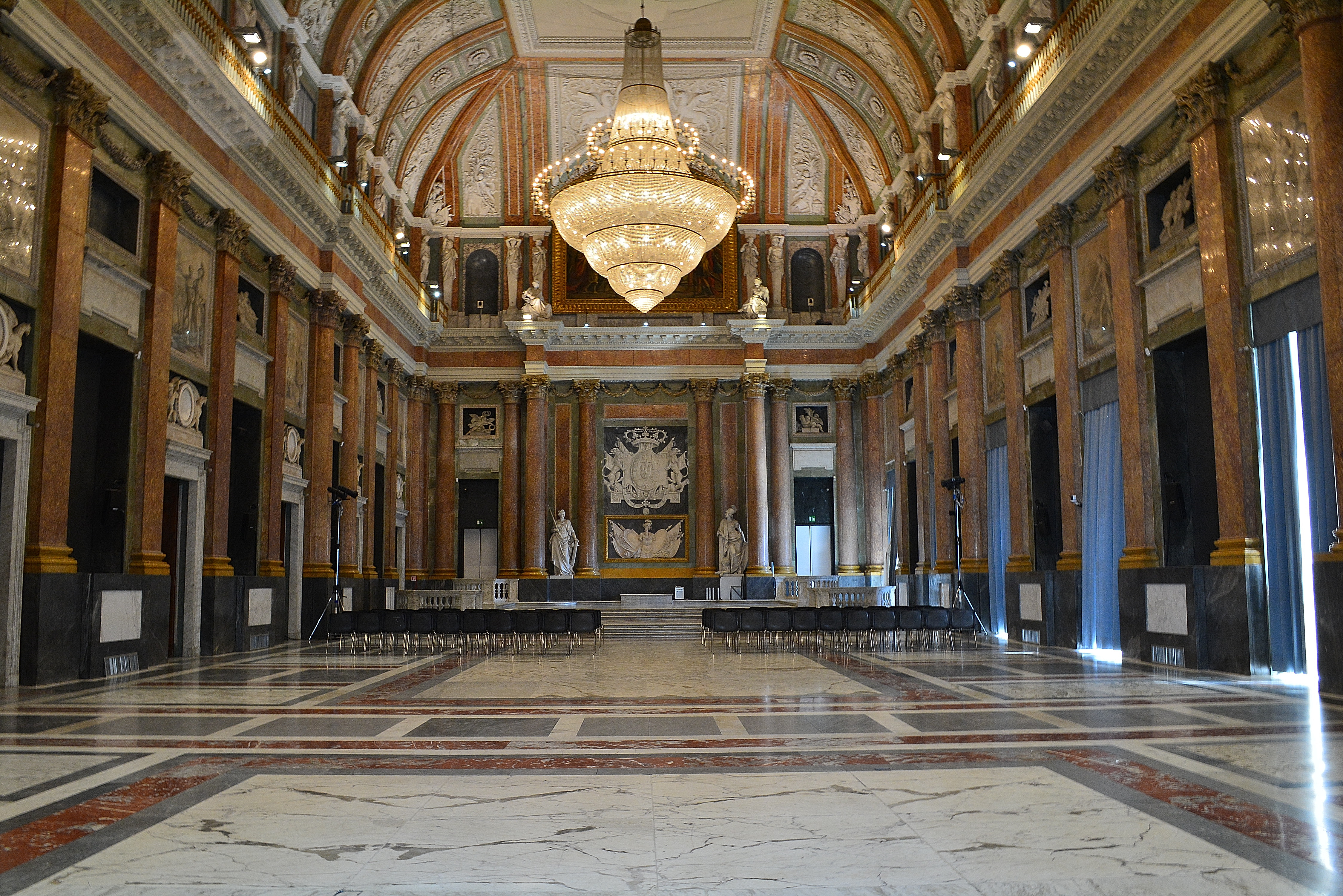 Palazzo Ducale di Genova This is a photo of a monument which is part of cultural heritage of Italy.